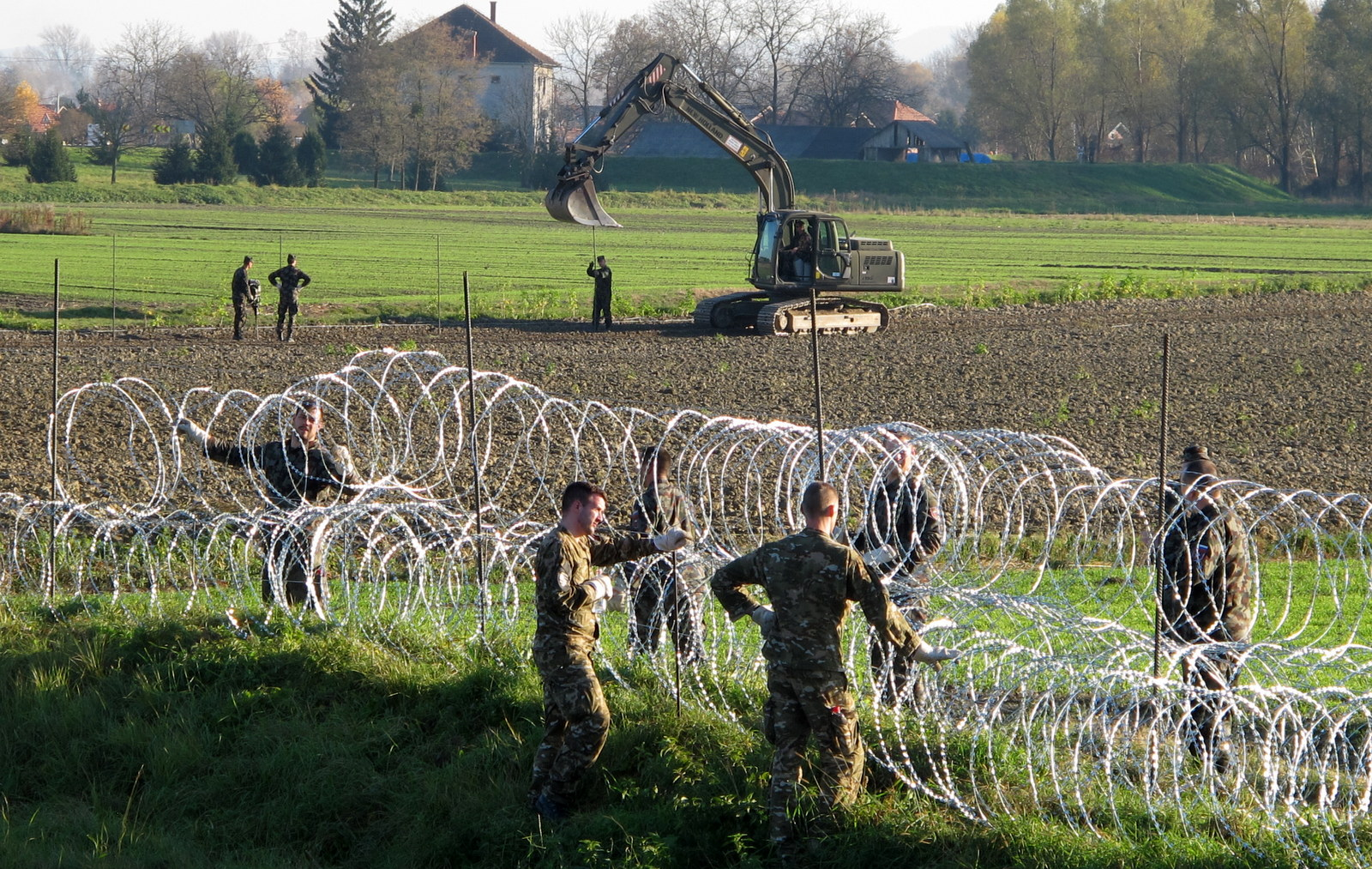 Pripadniki Slovenske vojske med postavljanjem bodeče oziroma rezilne žice na meji s Hrvaško, Središče ob Dravi, november 2015. Ministrica obiskala pripadnike Slovenske vojske in URSZR, ki pomagajo v nastanitvenem centru in na meji.